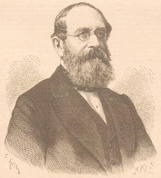 Gustav Adolf von Klöden. In: Illustriertes Unterhaltungs-Blatt: wöchentliche Beilage zum Darmstädter Tagblatt. Darmstadt, 1888